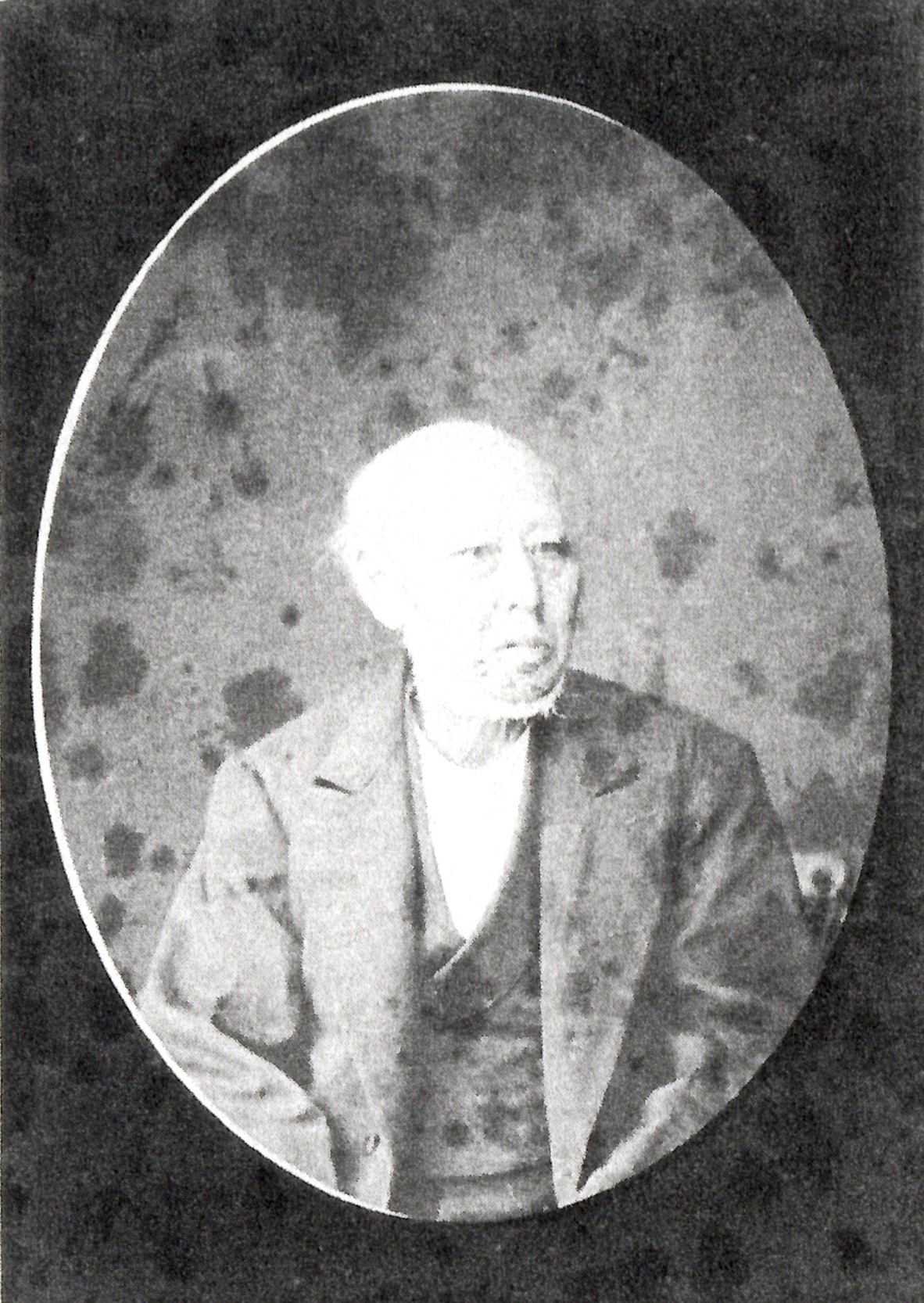 谷衛昉の肖像写真。